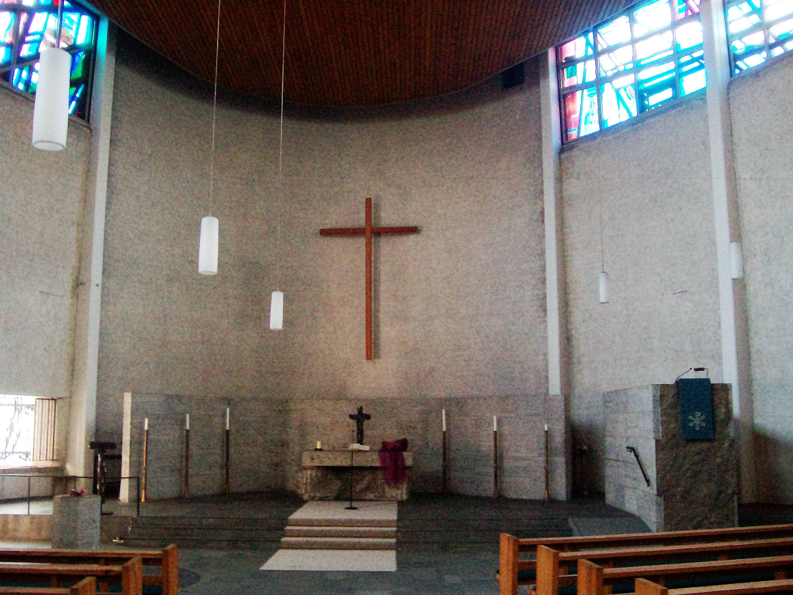 Petruskirche, Gießen, Hessen, Deutschland